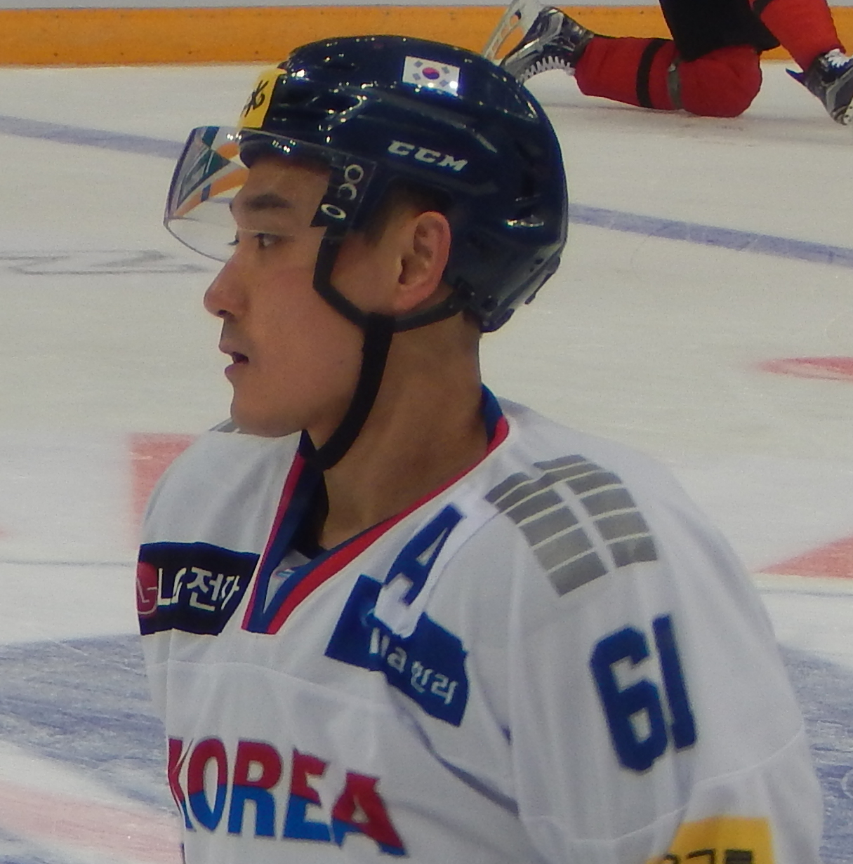 Кубок Первого Канала 2017, матч Канада - Южная Корея (13 декабря 2017) 61 LEE,Don Ku (KOR)